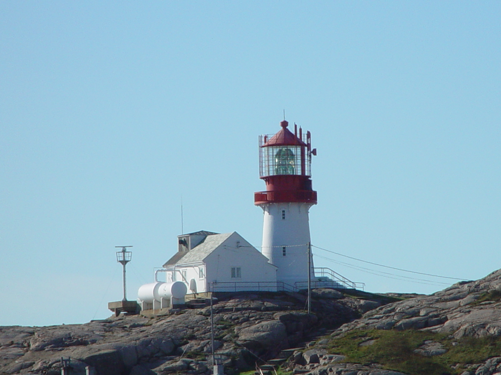 Lindesnes fyr